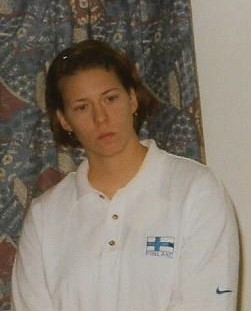 Mikaela Ingberg Suomen joukkueen mitalikahvitilaisuudessa yleisurheilun Euroopan-mestaruuskilpailuissa Budapestissa 23. elokuuta 1998.